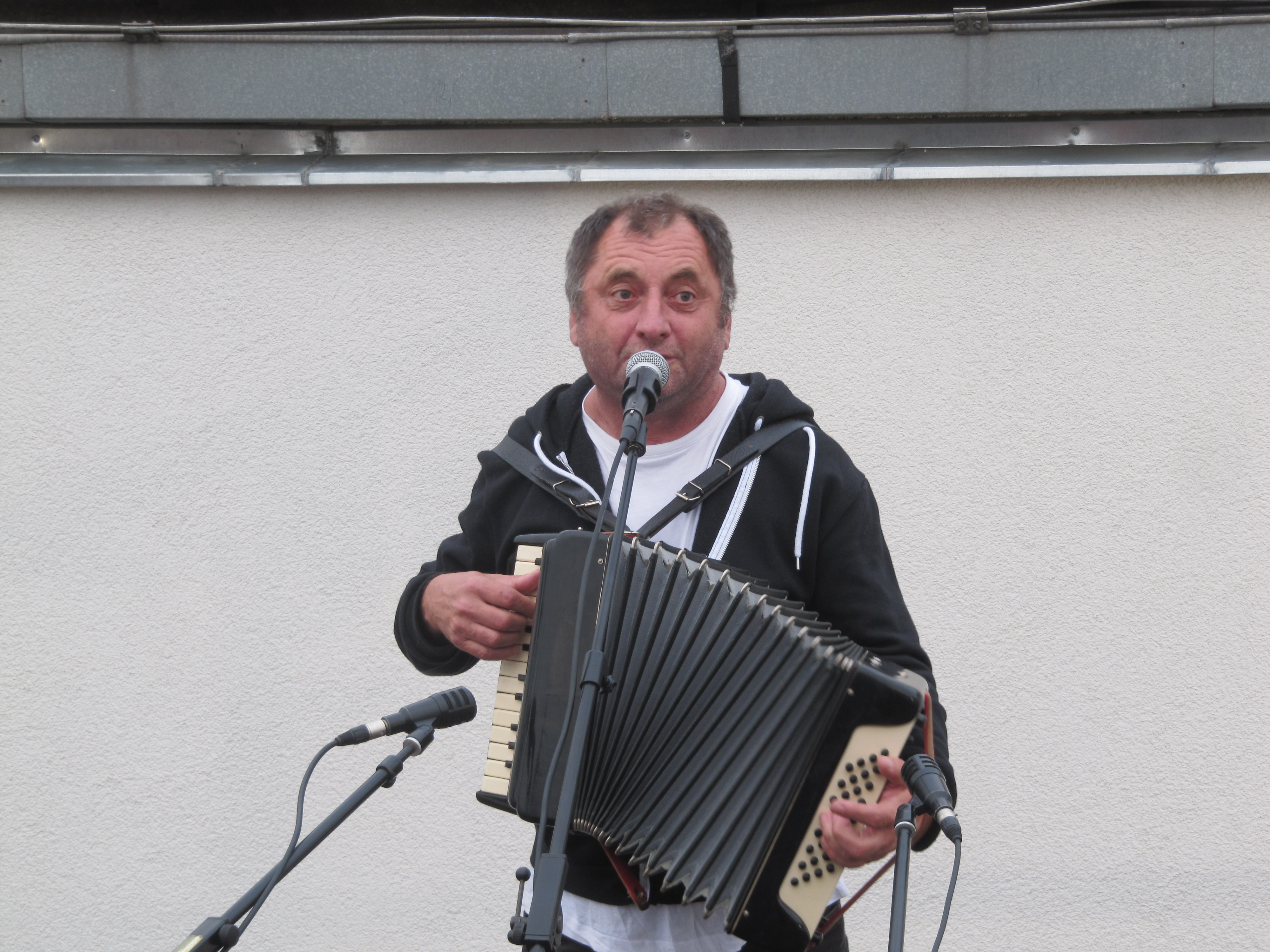 Václav Koubek v Uherském Hradišti, červen 2013